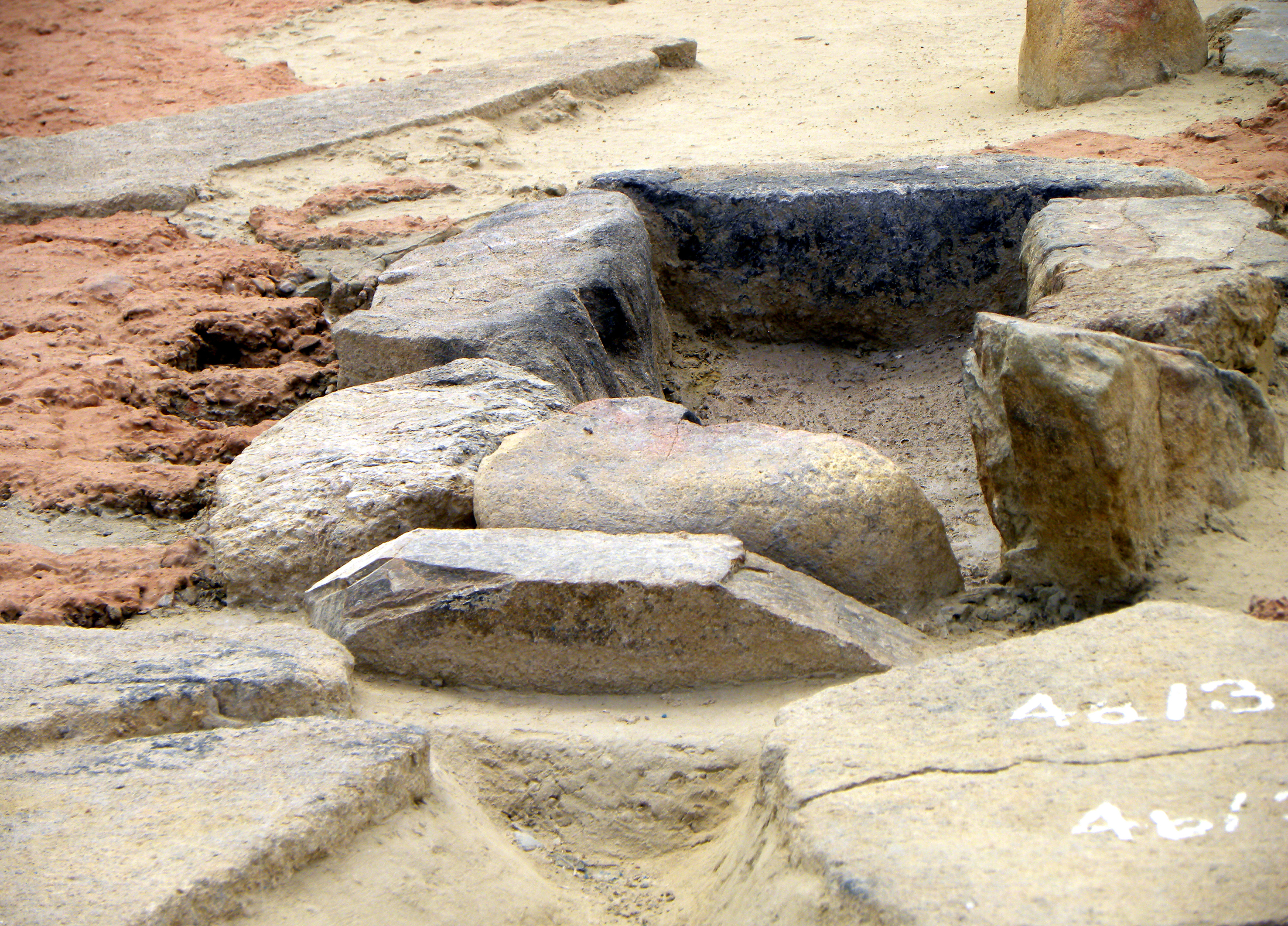 Lepenski vir